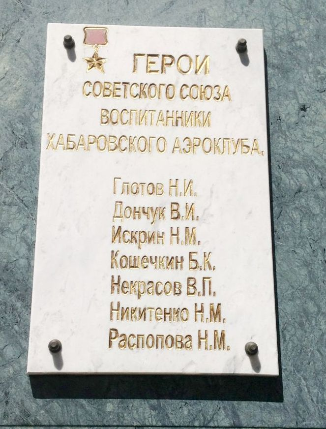 Мемориальная доска: Герои Хабаровского аэроклуба